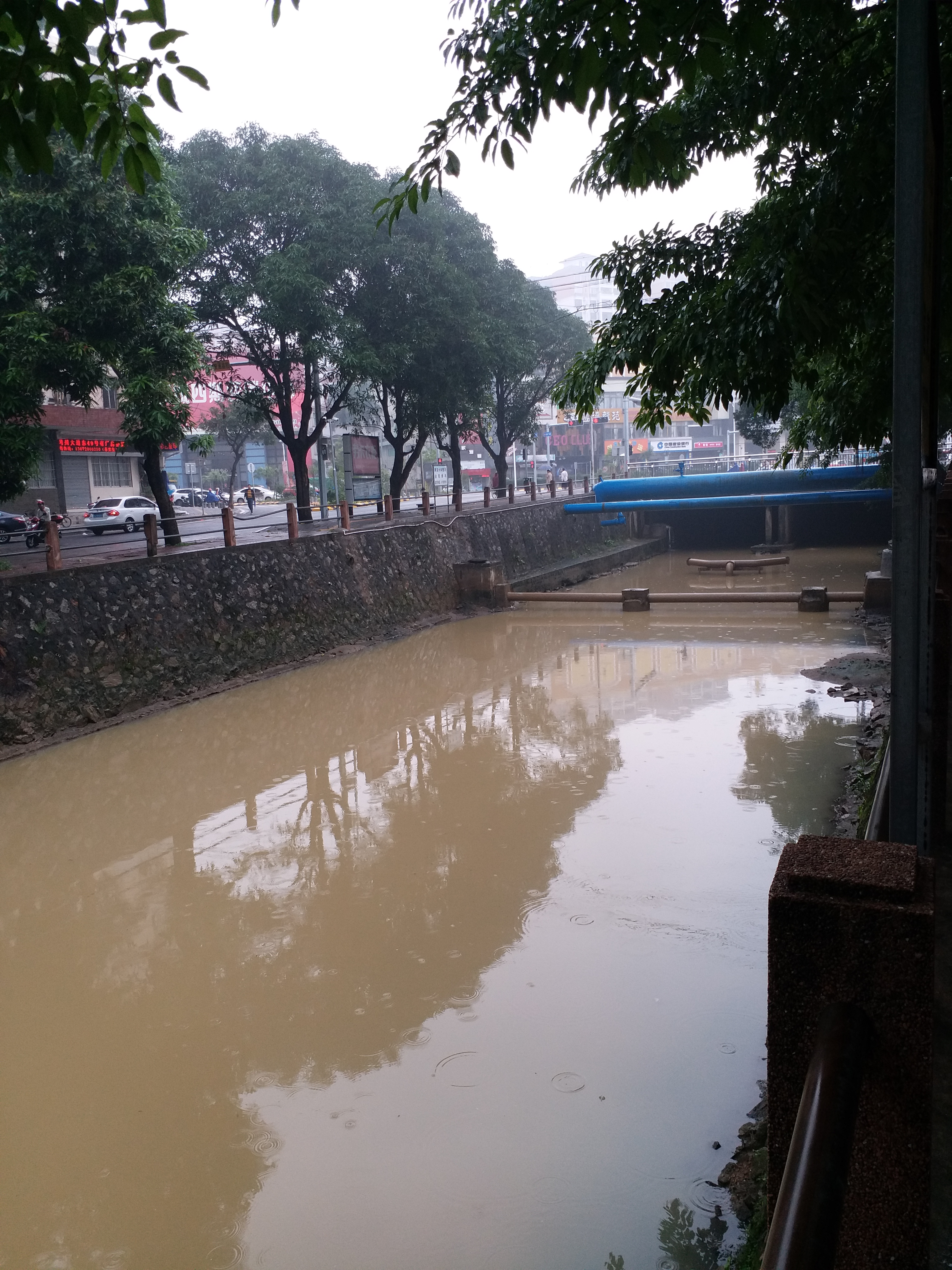 粵語: 2019年4月一場大雨後的紫水河